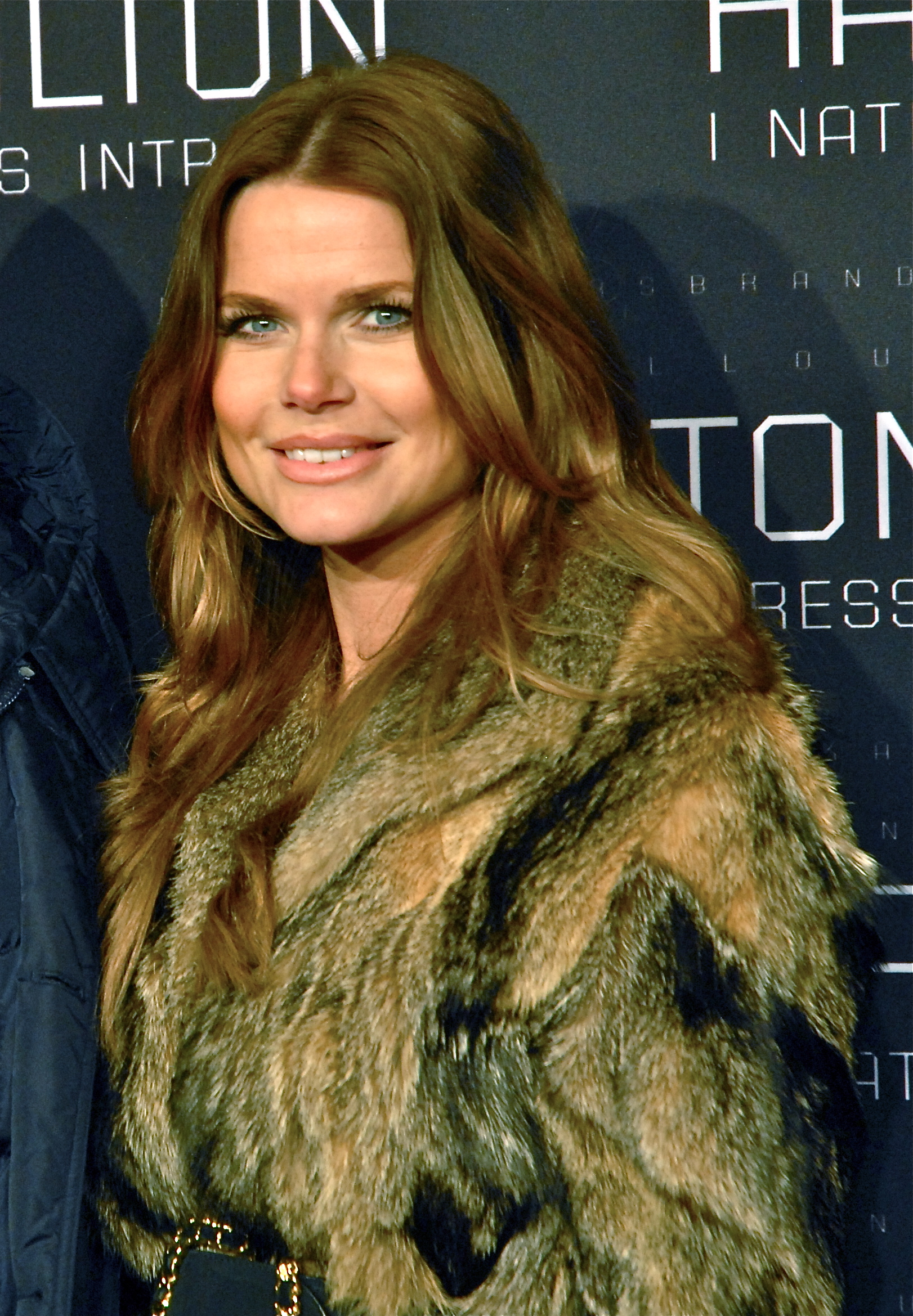 Valerie Aflalo på galapremiären av Hamilton - I nationens intresse, på biograf Sergel i Stockholm den 9 januari 2012.